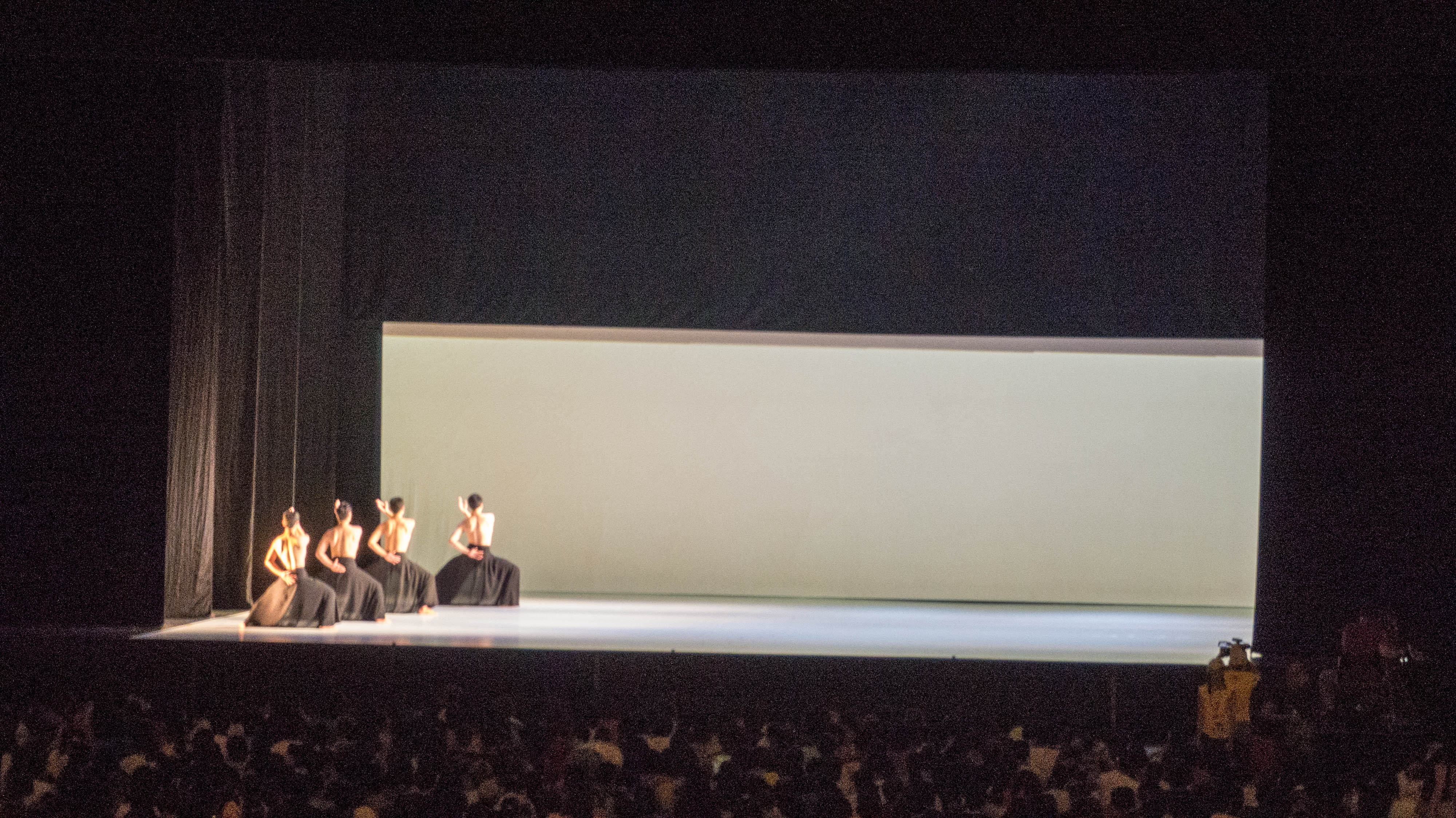 《松煙》開場，攝於國家音樂廳露臺西南角。